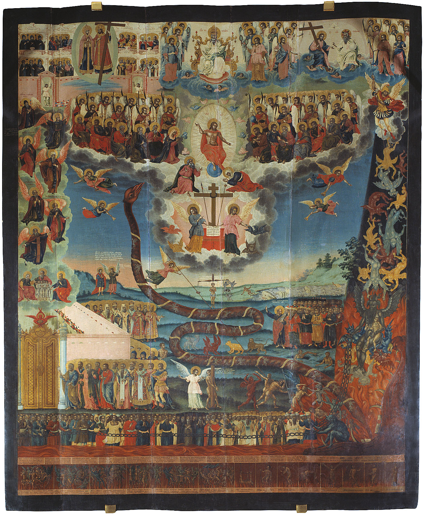 Икона "Страшный суд"